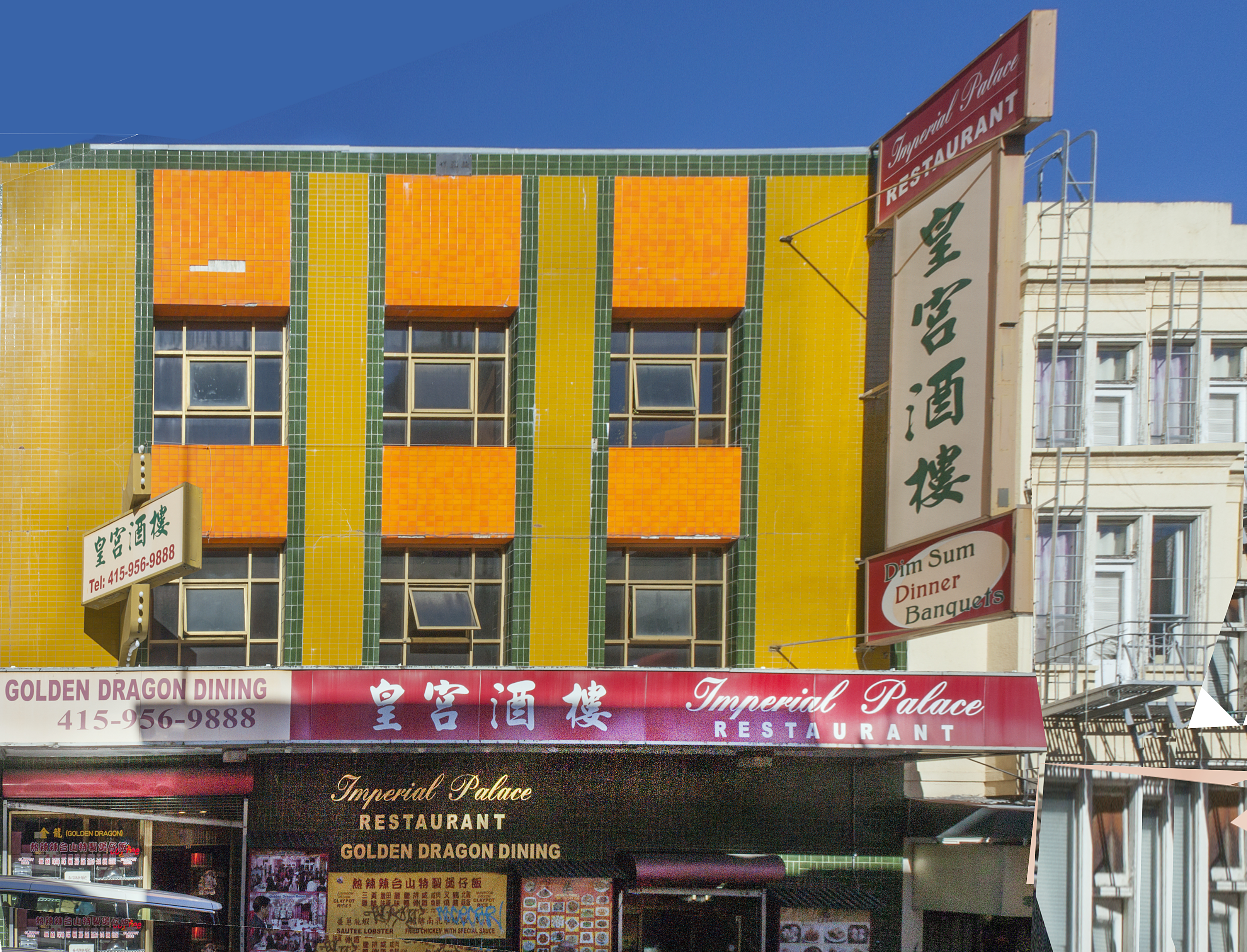 _MG_7911 chi town